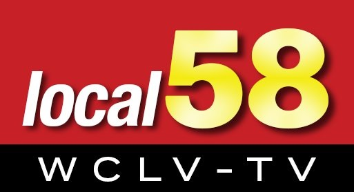 Local 58 logo.